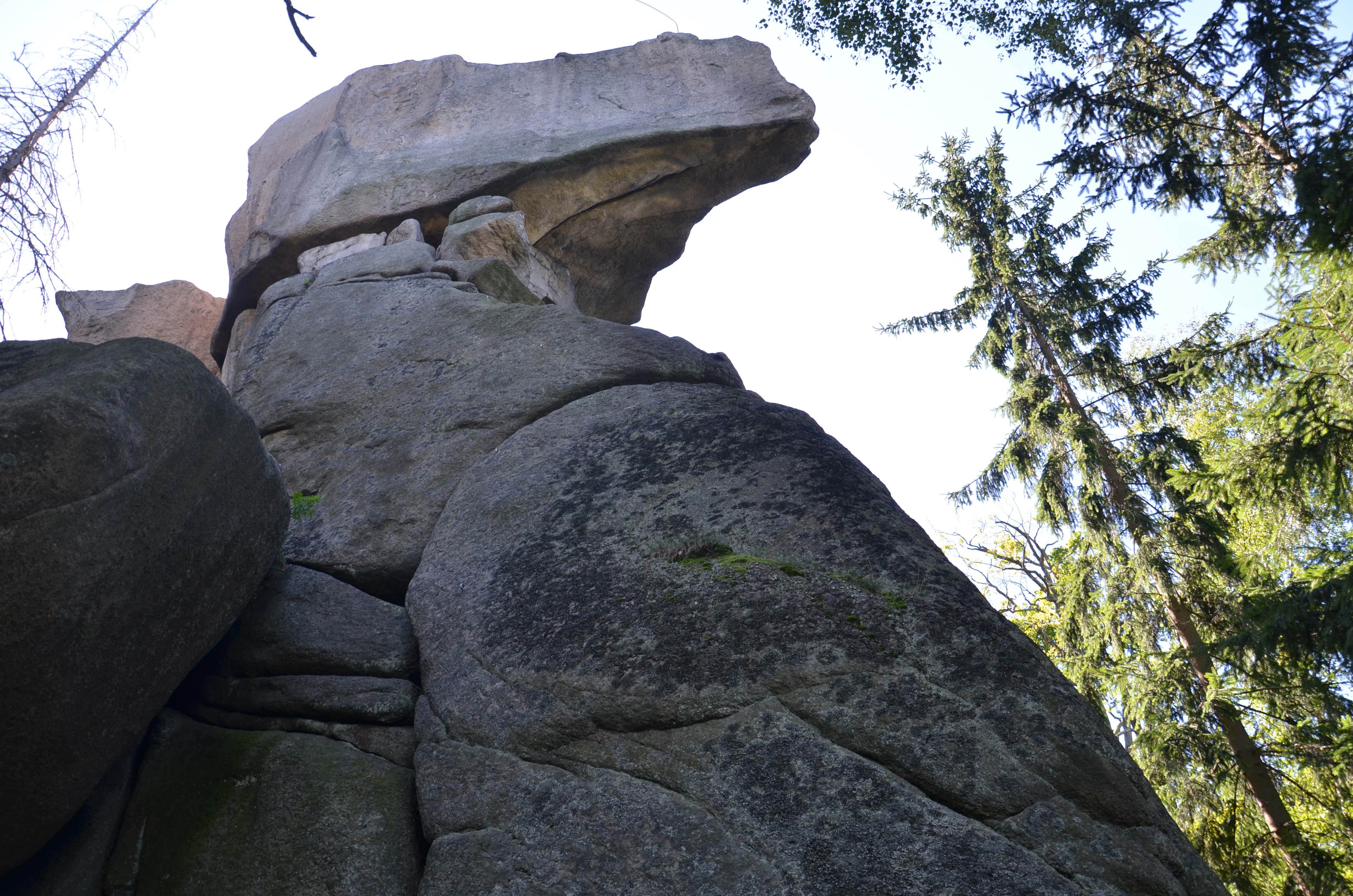 Skała o nazwie Fajka-Dziubek w Masywie Fajki